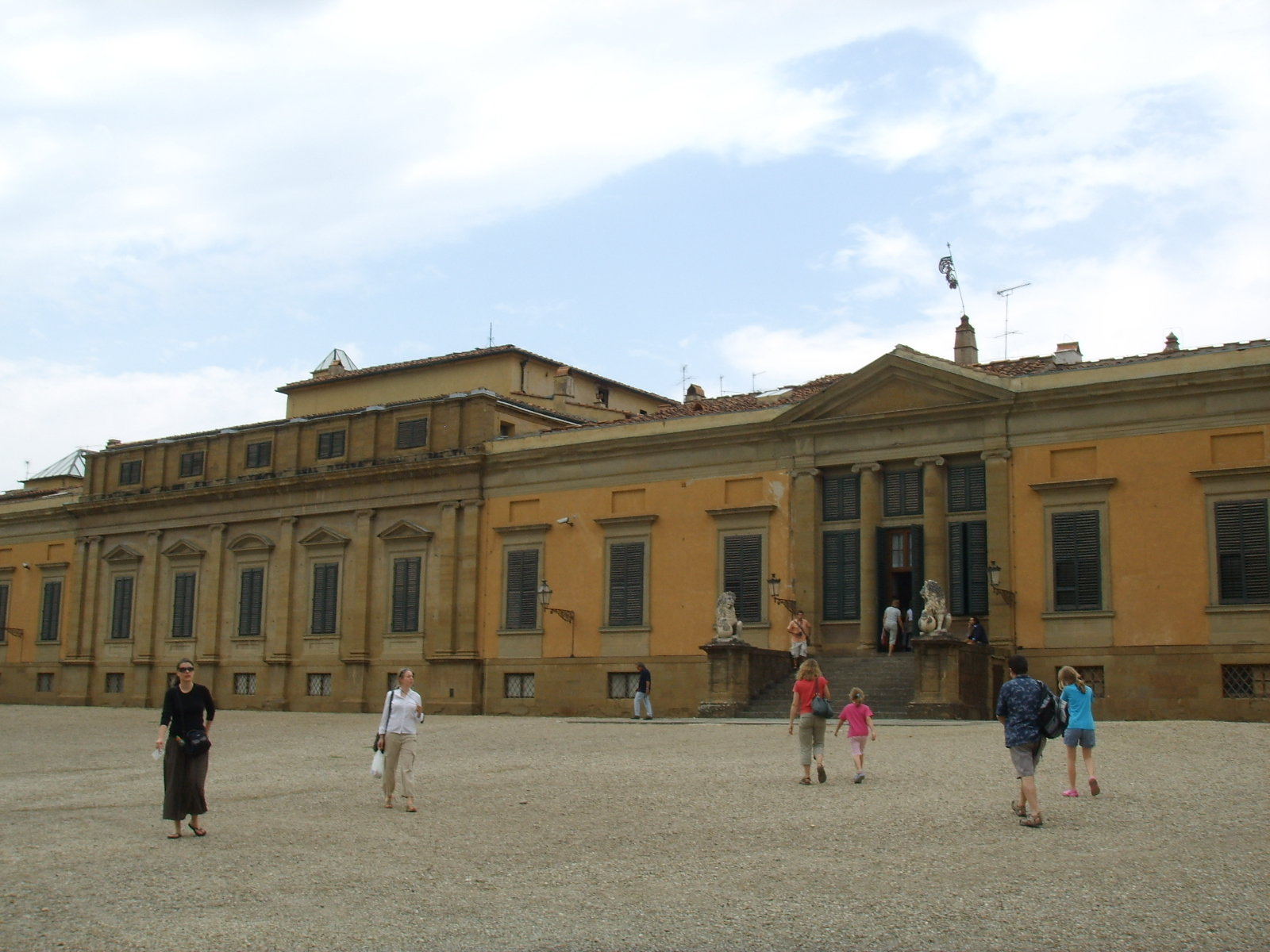 Boboli, palazzina della meridiana, esterno